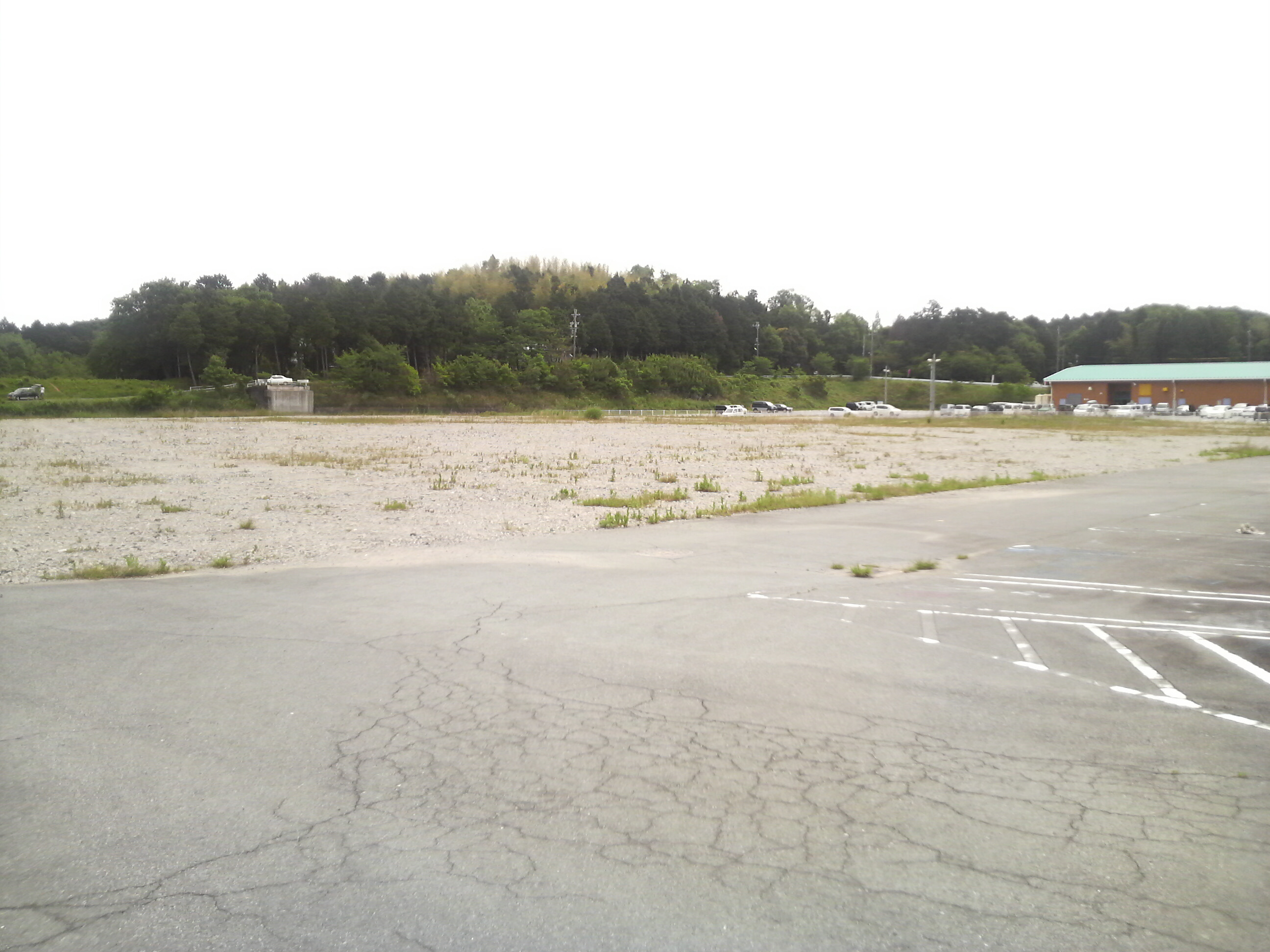 ジャスコシティ玉城の跡地。右奥に見えるのがダイナム玉城店（パチンコ店）